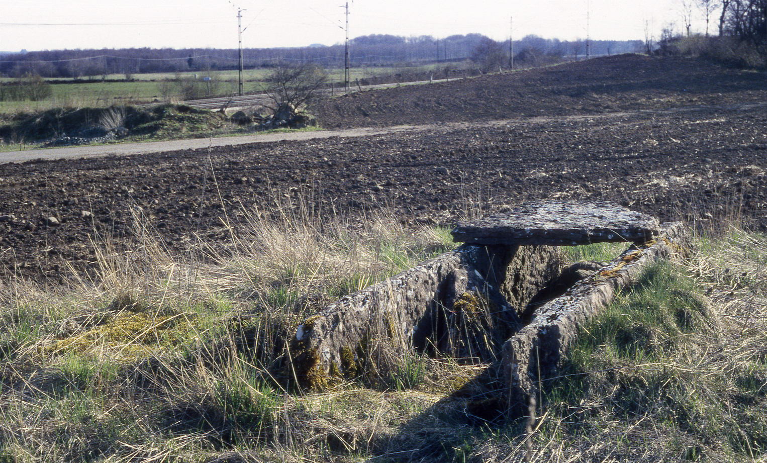 Nästegårdens hällkista (RAÄ-nr Falköpings västra 1:1) ligger strax väster om Falköping, Falköpings kommun, f.d. Skaraborgs län, Västergötland, Västra Götalands län, Sverige. Stenkammargraven brukar klassificeras som hällkista, men likheterna med Slutarpsdösen gör det möjligt att det snarare är fråga om en kistformad dös.